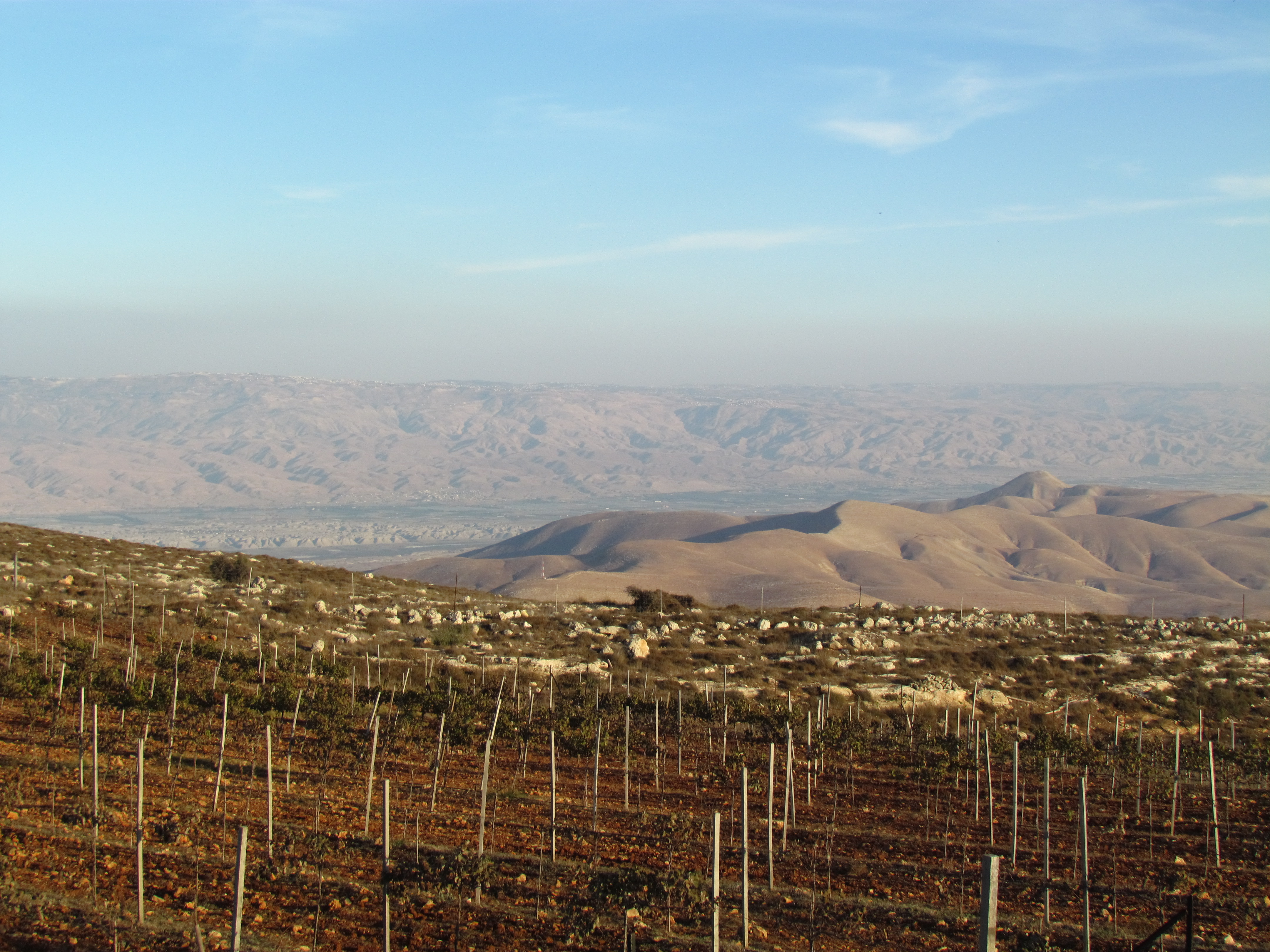 נוף בקעת הירדן והרי הגלעד הנשקפים מגבעת ארנון.